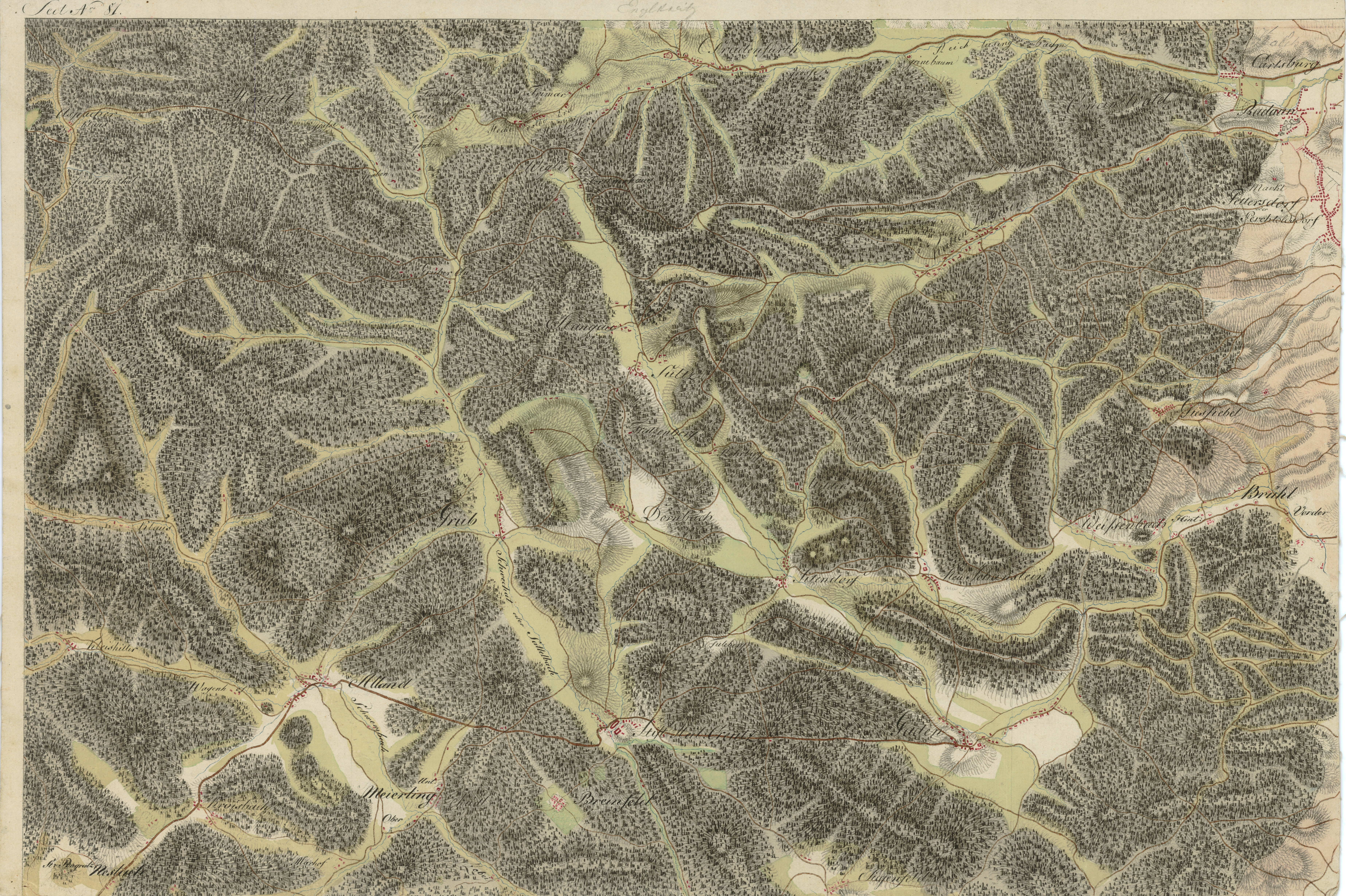 historische Landkarte BIXa242 sectio 081c Josephinische Landesaufnahme: südlicher Wienerwald, Gebiet von Alland, Heiligenkreuz, Gaaden, Brühl, Kaltenleutgeben, Breitenfurt, Rodaun, Perchtoldsdorf südwestlich von Wien, Niederösterreich, Österreich